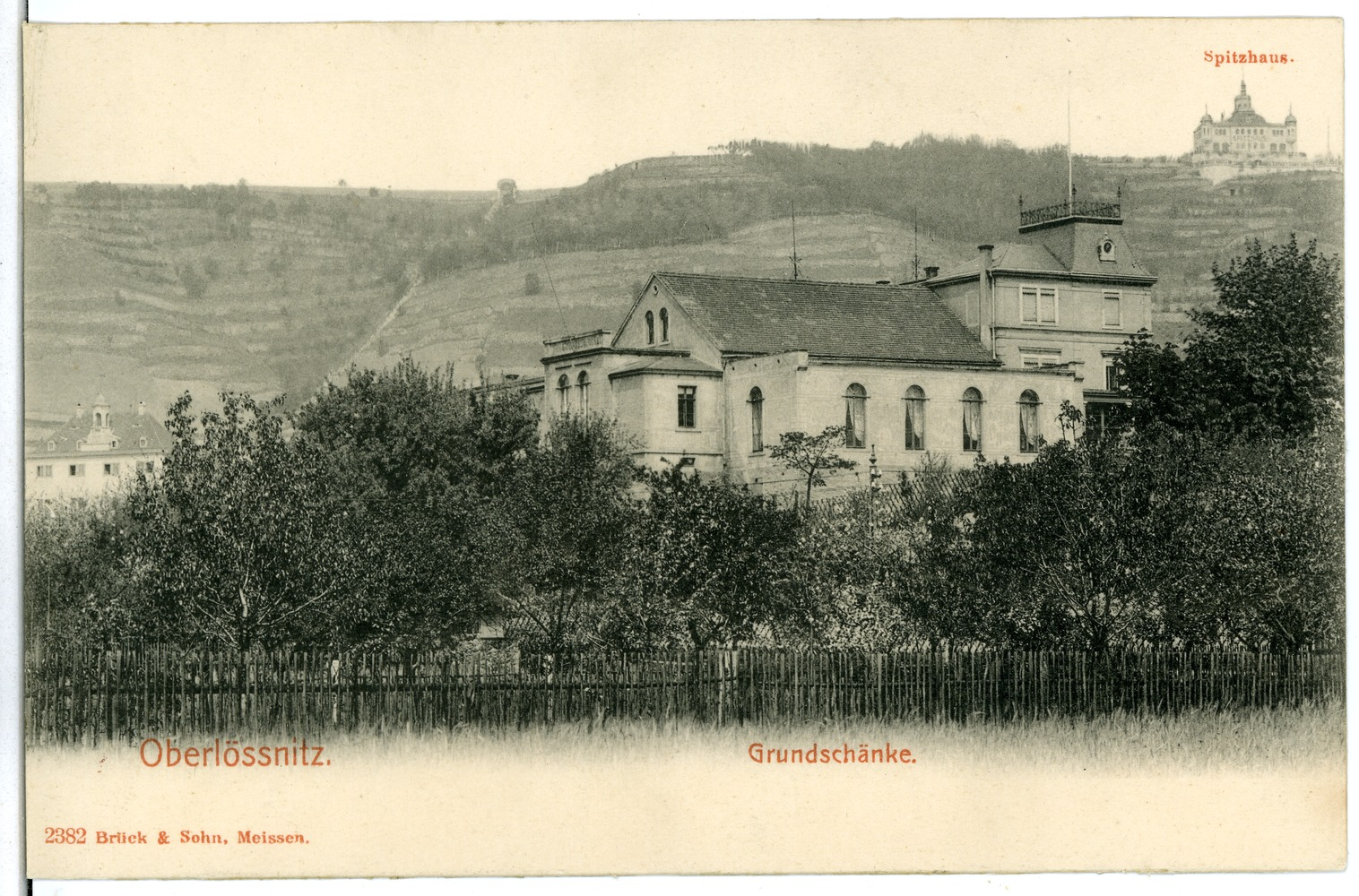 Oberlößnitz; Grundschänke This postcard is from publisher Brück & Sohn in Meißen ( postcard has a unique number 02382 and is available in a higher resolution at the publisher. This images was uploaded in a cooperation project between Wikipedians and the publisher.